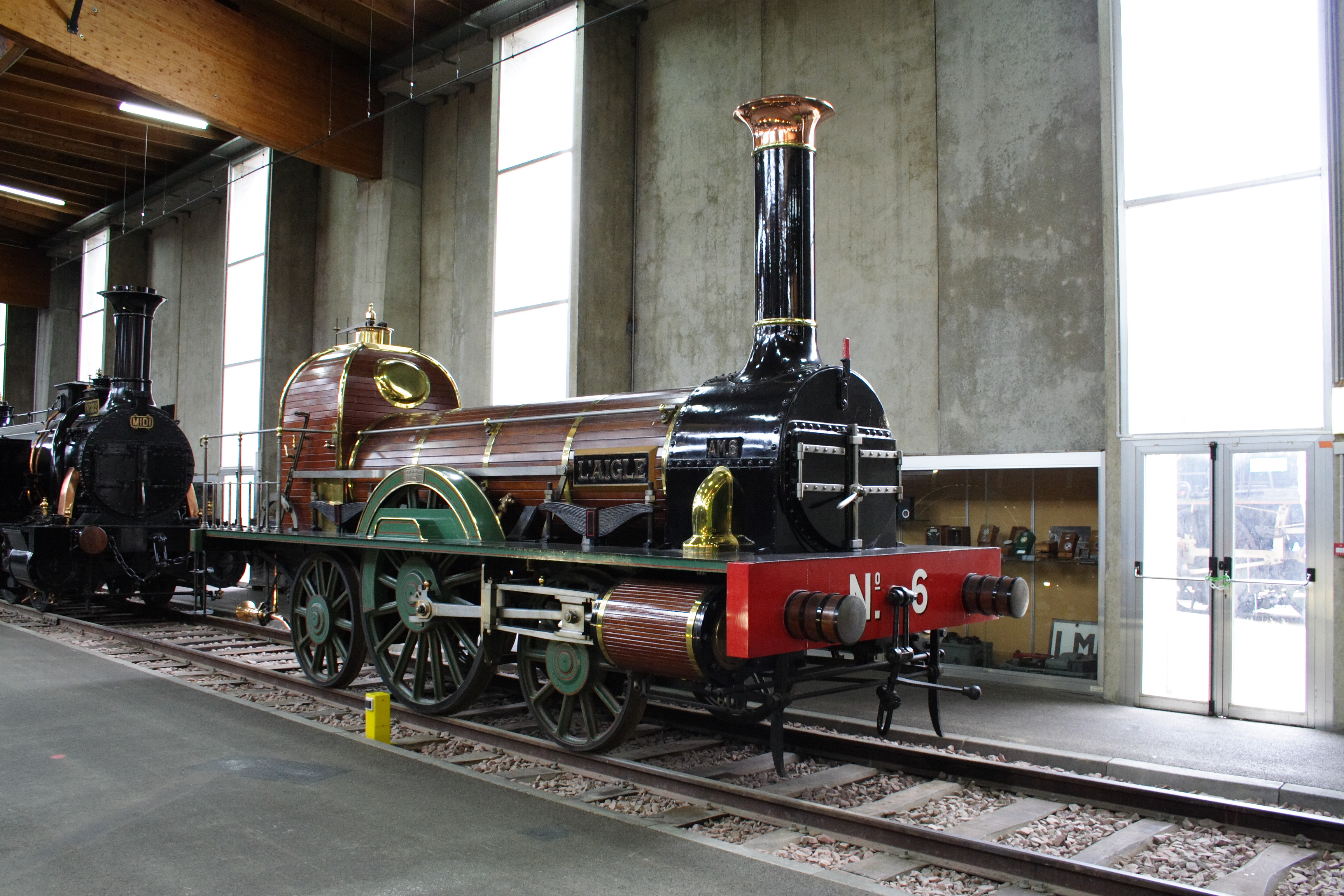 a steam locomotive "Aigle" at the Cité du Train de Mulhouse(Mulhouse, France)